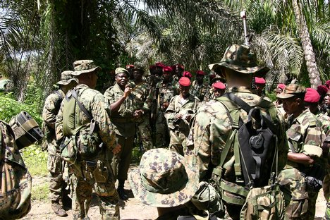 Moussa Dadis Camara speaking